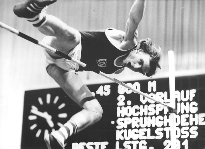 Edgar Kirst ADN-ZB Mittelstädt 5.3.77 Berlin: DDR-Leichtathletikmeisterschaften in der Dynamo-Sporthalle. Höhepunkt des ersten Tages der Meisterschaften war der Hochsprung der Männer. Gemeinsam mit Rolf Beilschmidt stellte Edgar Kirst (SC Dynamo Berlin) die von dem Jenaer kürzlich erzielte Bestleistung ein.